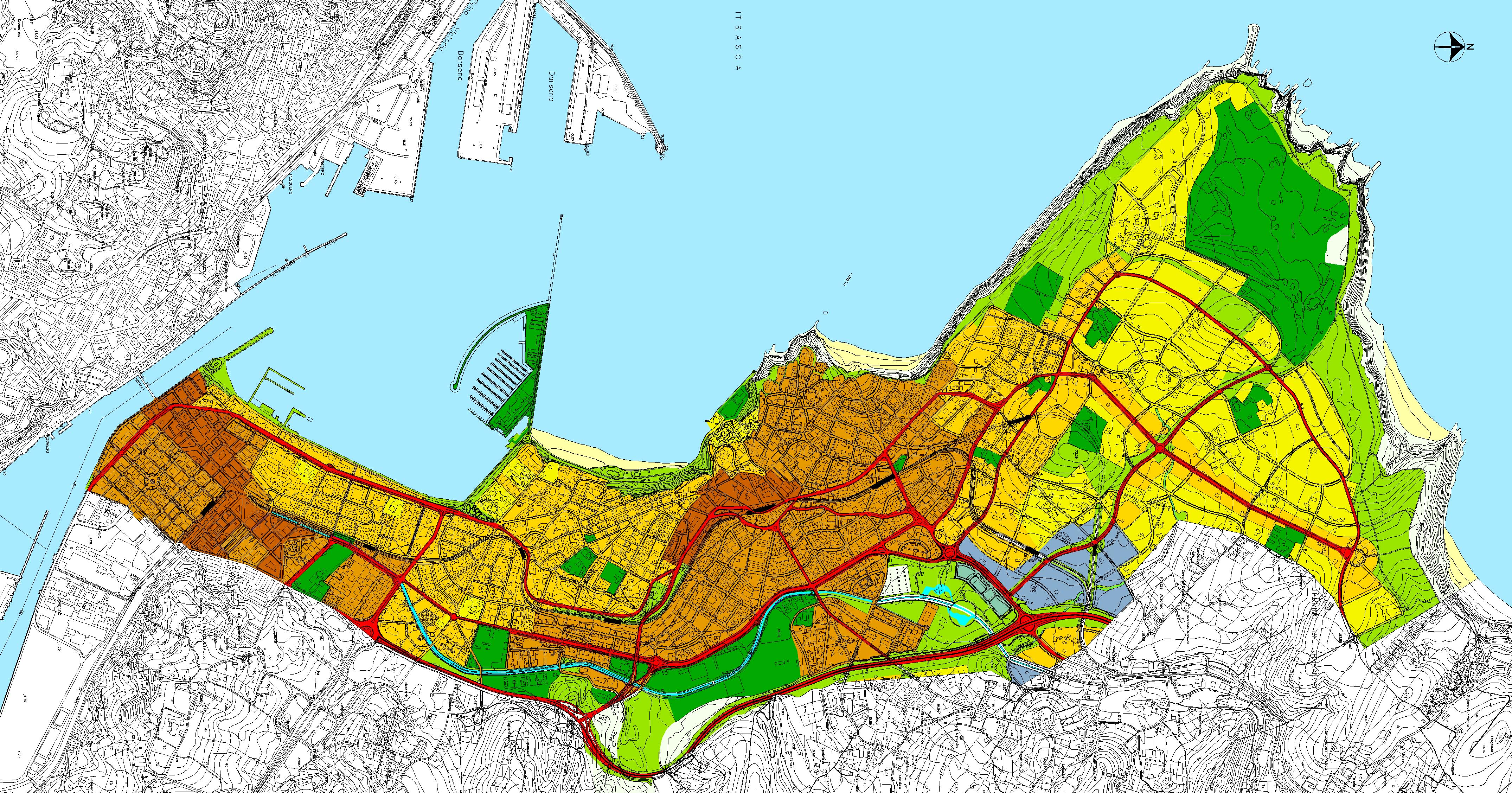 Getxoko 2001eko Plan Orokorraren egitura organikoa eta erabilera globalak